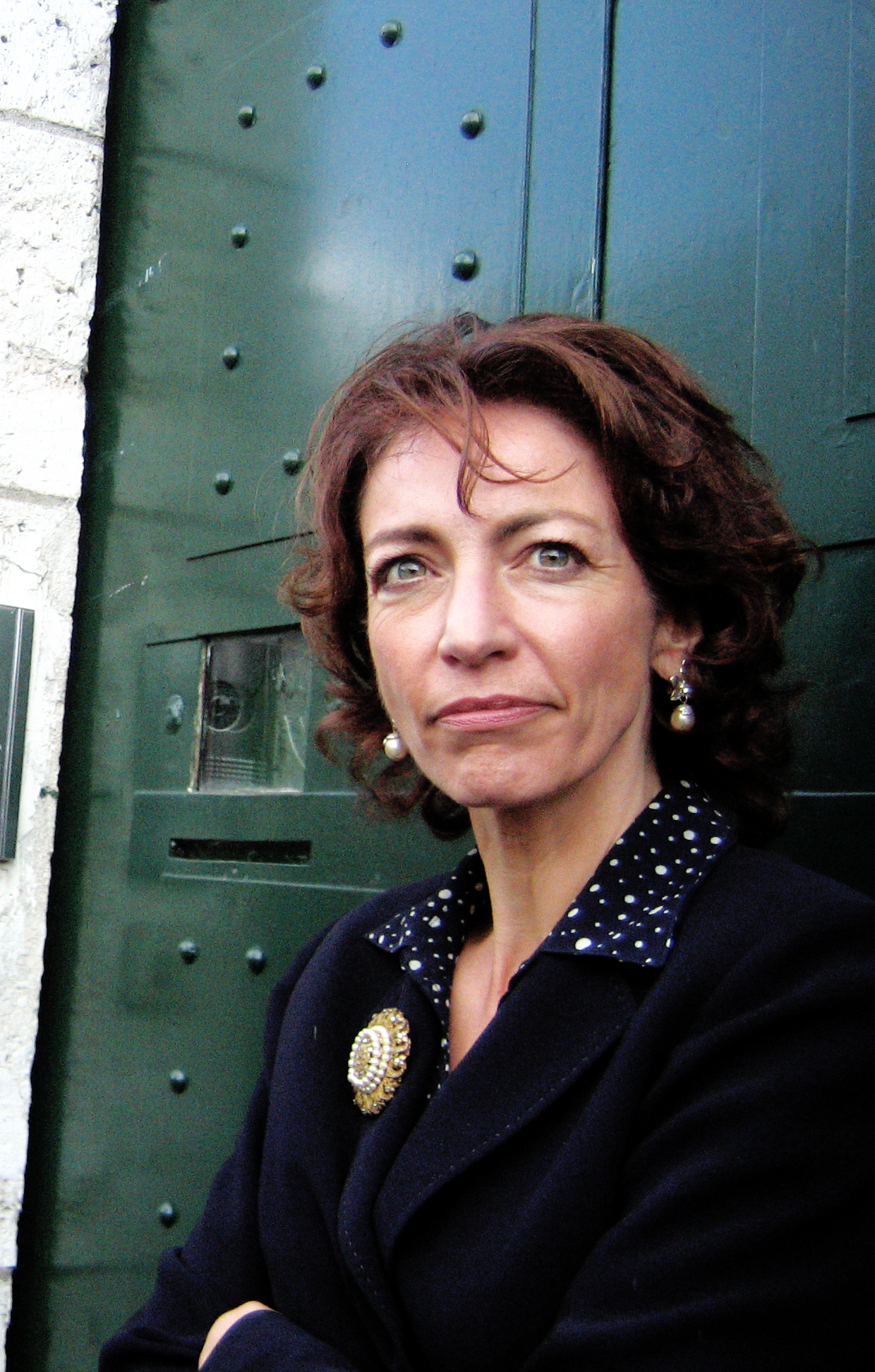 Marisol Touraine Juillet 2007